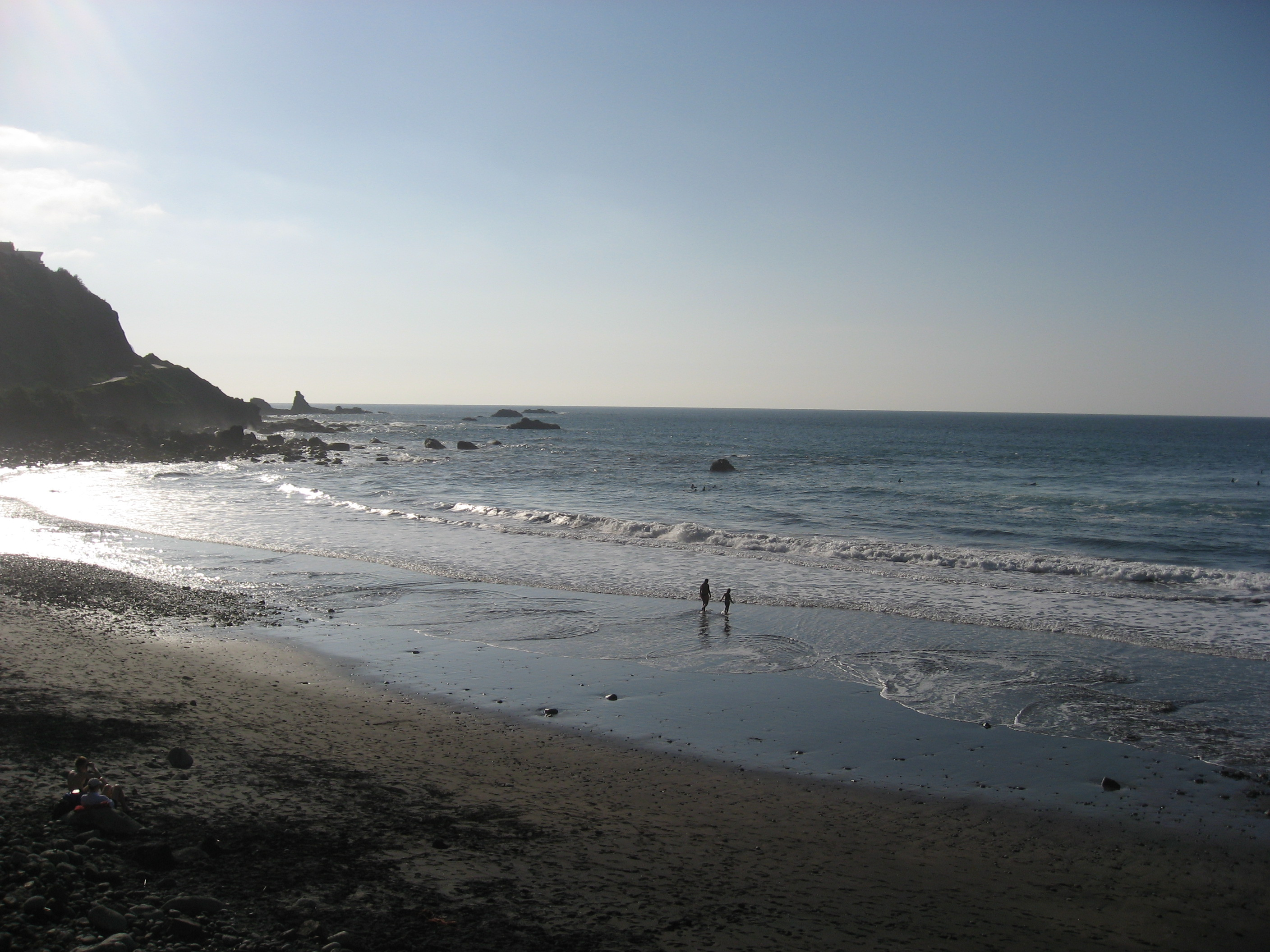 Playa de Almáciga